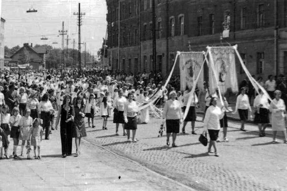 Legnica, ul. Wrocławska, sztandary kół różańcowych parafii św. Trójcy(lata 80-te XX w.)